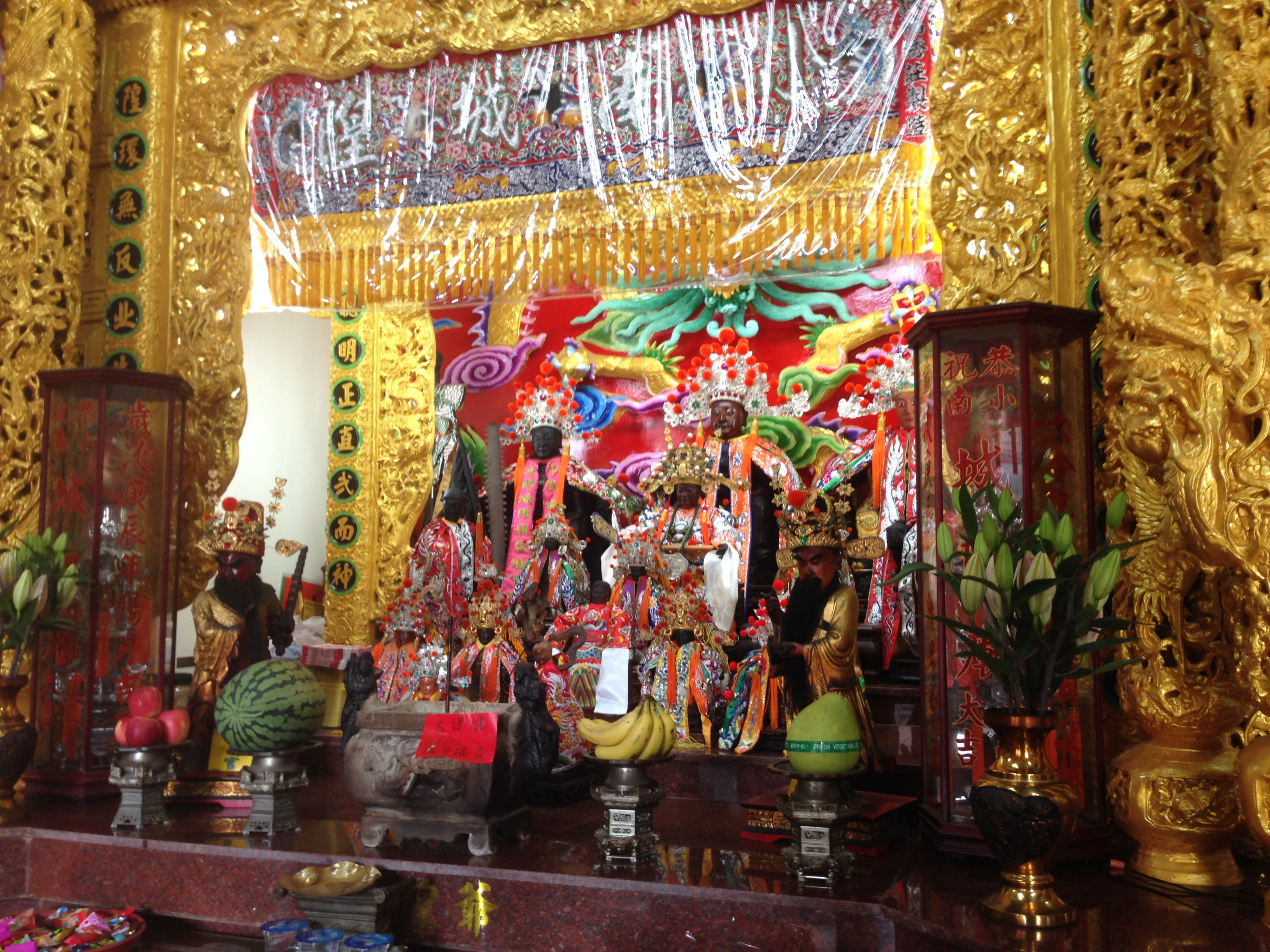 中文（台灣）: 小南城隍廟朱一貴等神像